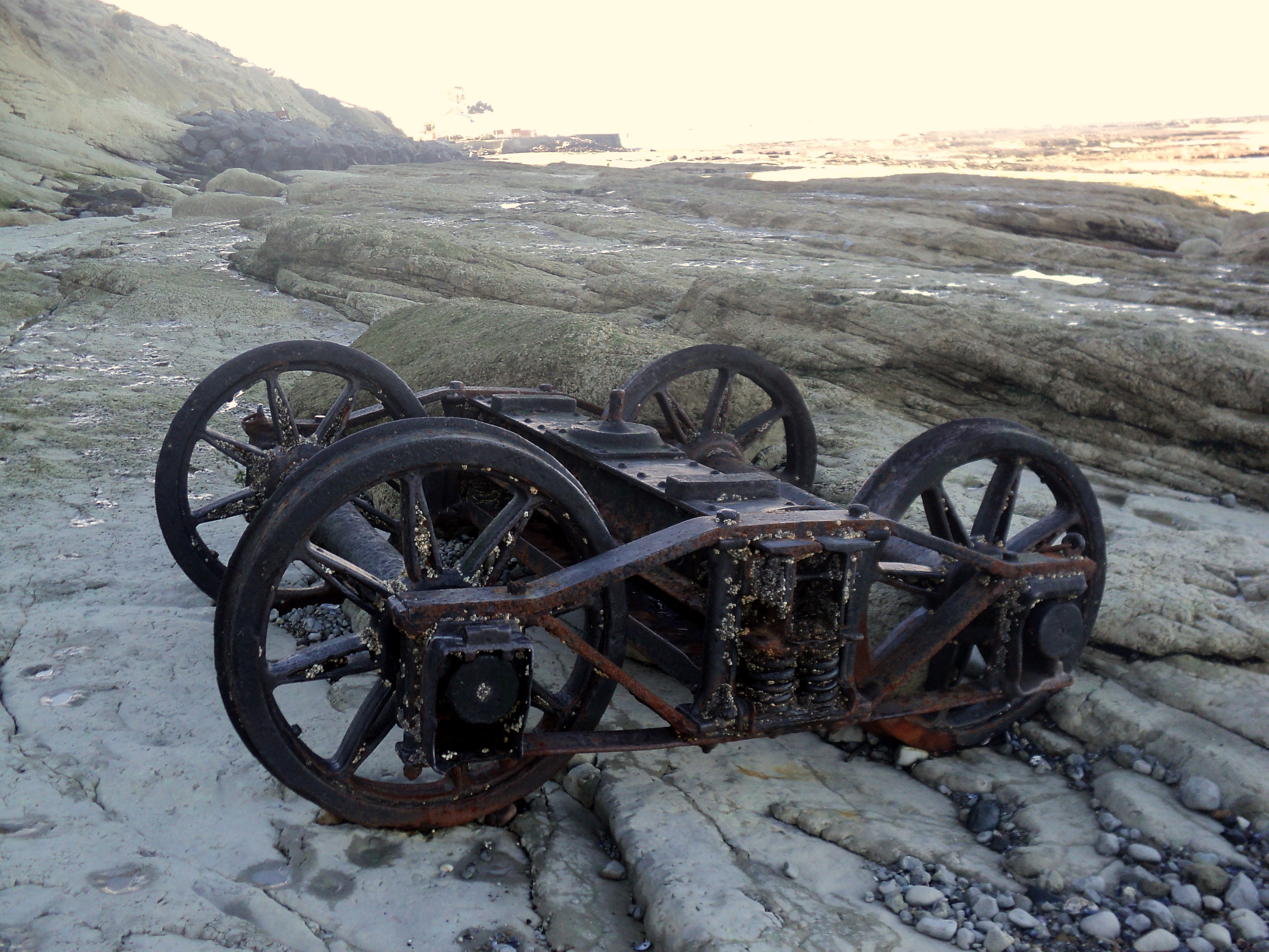 Bugie abandonado en la playa costanera, tramo del ferrocarril previo a km 2